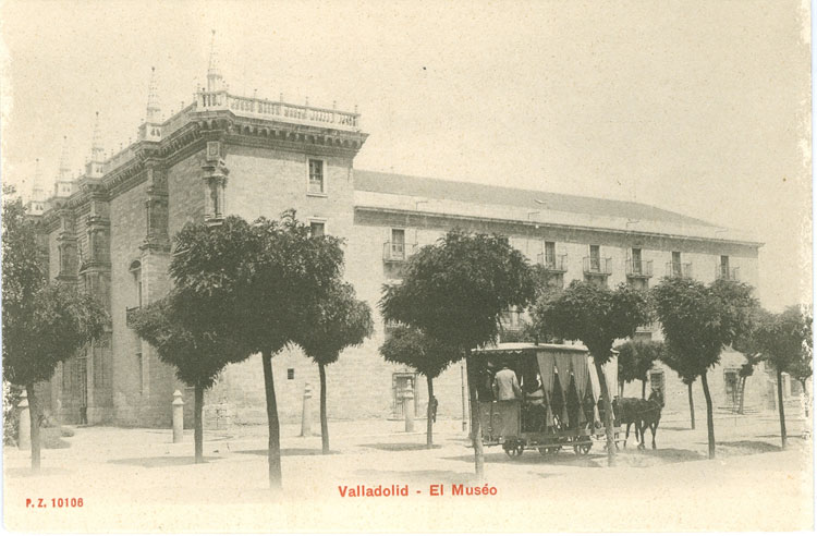 Palacio de Santa Cruz (Museo) - Valladolid - Postal Color